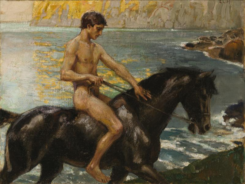 Reiter am Strand, Öl auf Leinwand. 50 x 65 cm . Rechts oben monogrammiert.